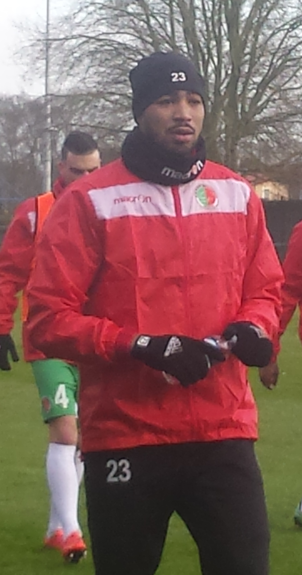 Albert Baning (au premier plan) avant la rencontre Lens B - Sedan, au Stade François-Blin d'Avion, match comptant pour le championnat de France de CFA (quatrième division française), le 24 janvier 2015.